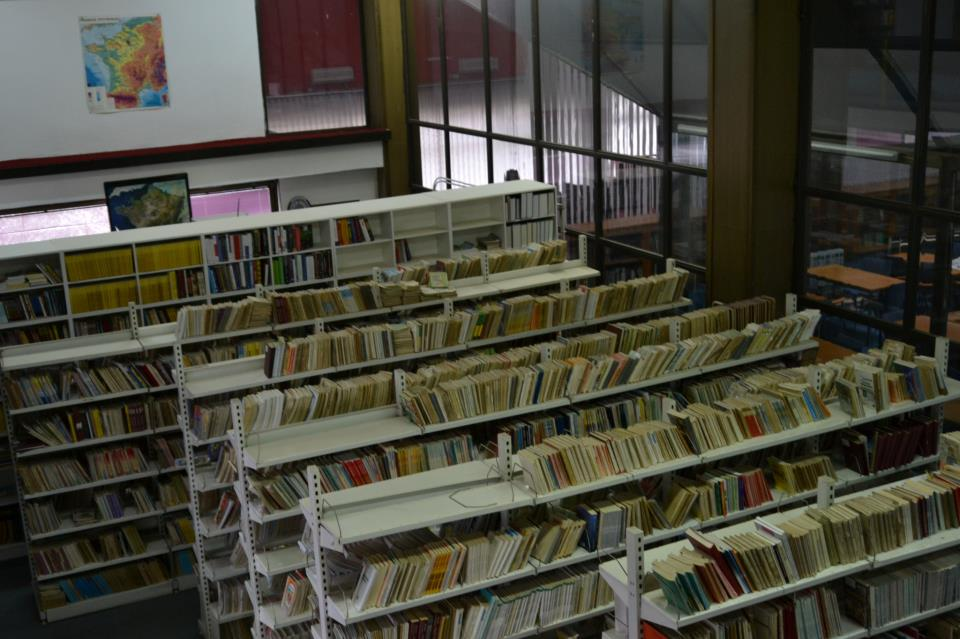 Билбиотека